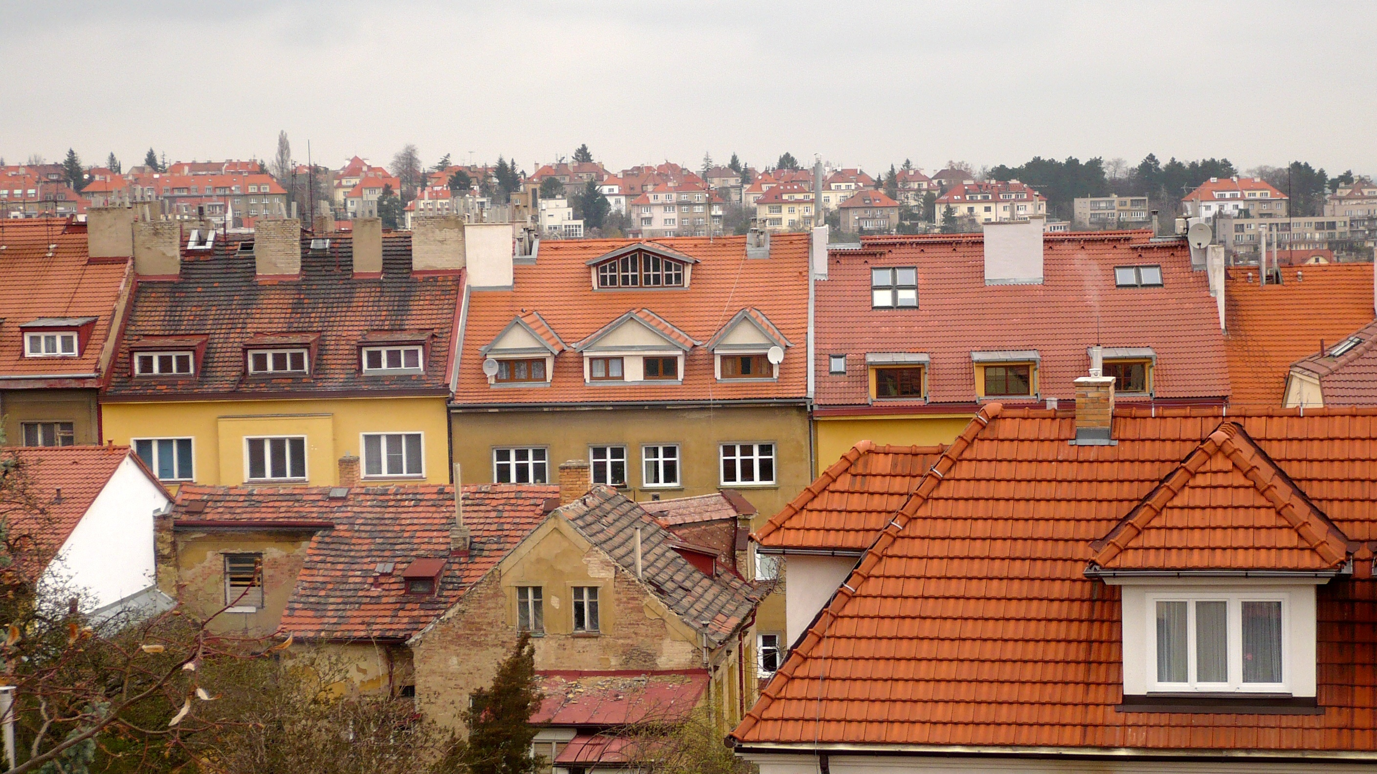 Praha, Břevnov - dva domy v předu, ulice U dvora, uprostřed Šlikova ulice, domy na horizontu jsou již ve Střešovicích